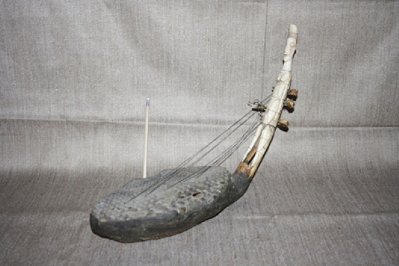 Harpe mangbetu du Zaïre